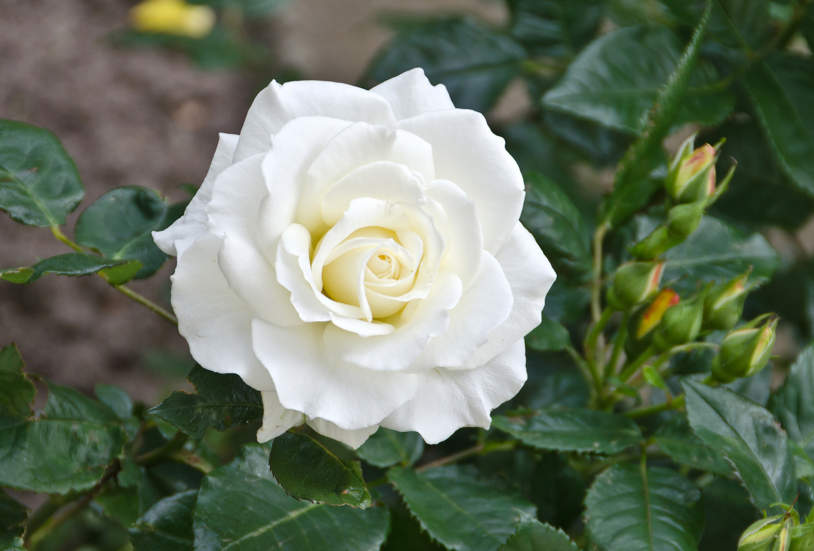 Kwiat róży